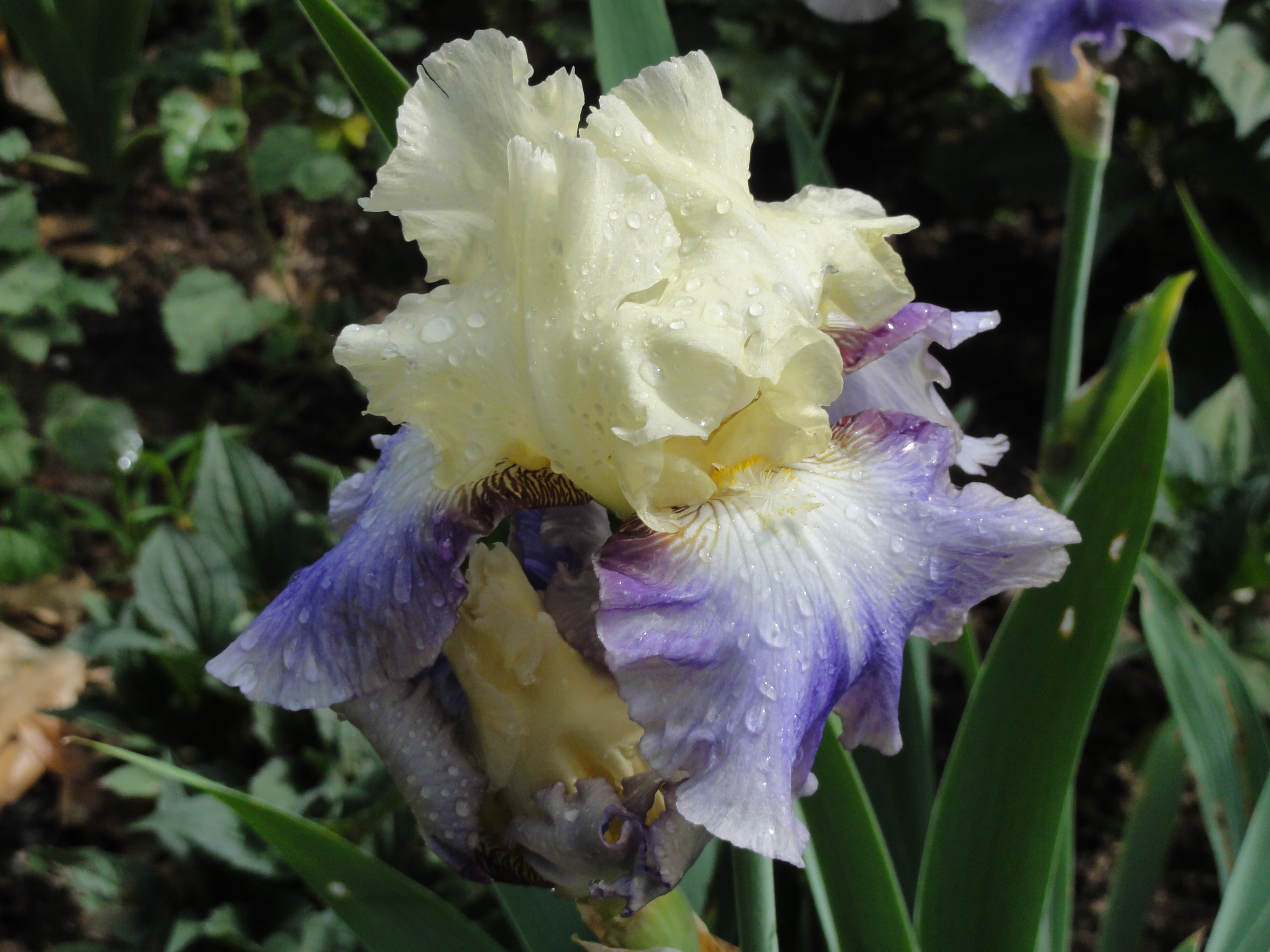 dans l'iriseraie du parc Chabrières d'Oullins